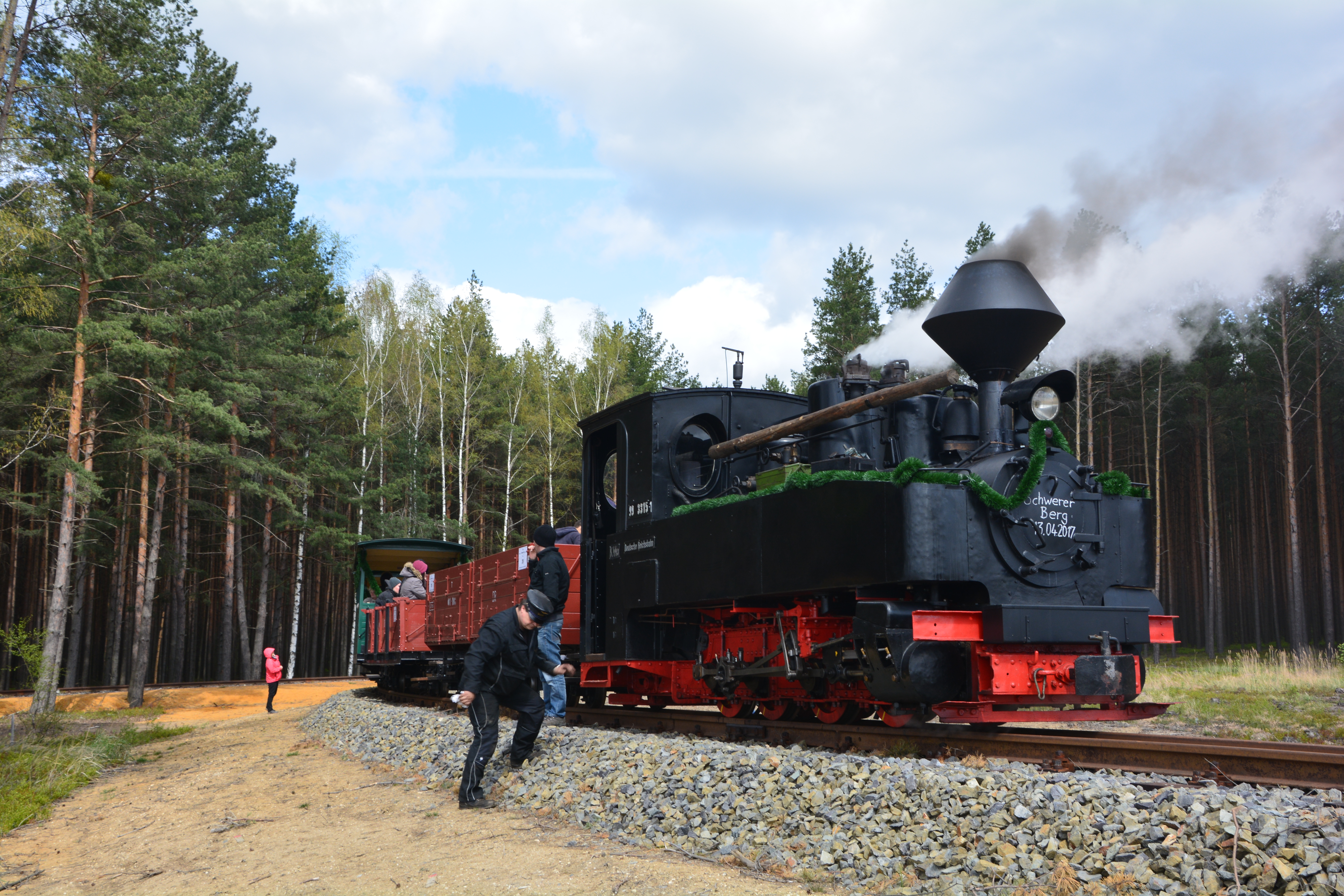 Waldeisenbahn Bad Muskau: Einweihung der "Tonbahn" am 14. bis 17. April 2017. Dampflok BR 99 3315-1, Baujahr 1917